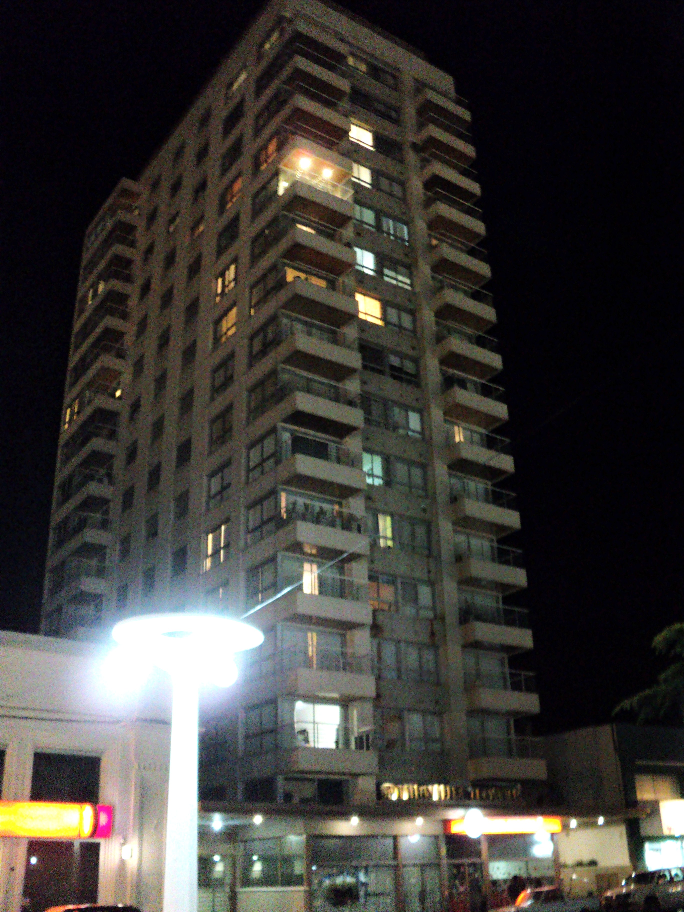 El Edificio Millennium. Burgos 621, Azul, Prov. de Buenos Aires, Argentina.